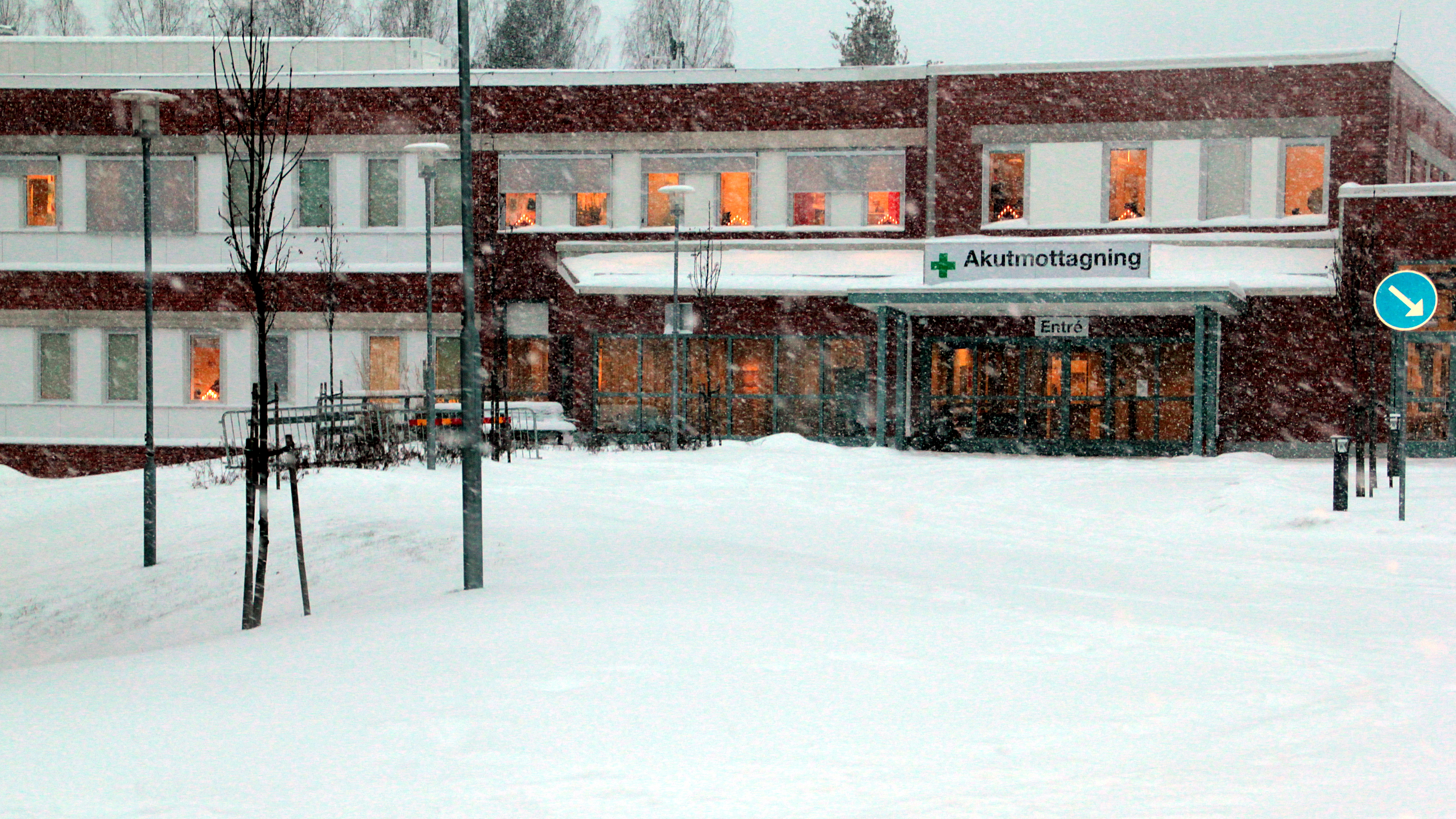 Mora lasarett, Mora, Dalarnas län, Sverige